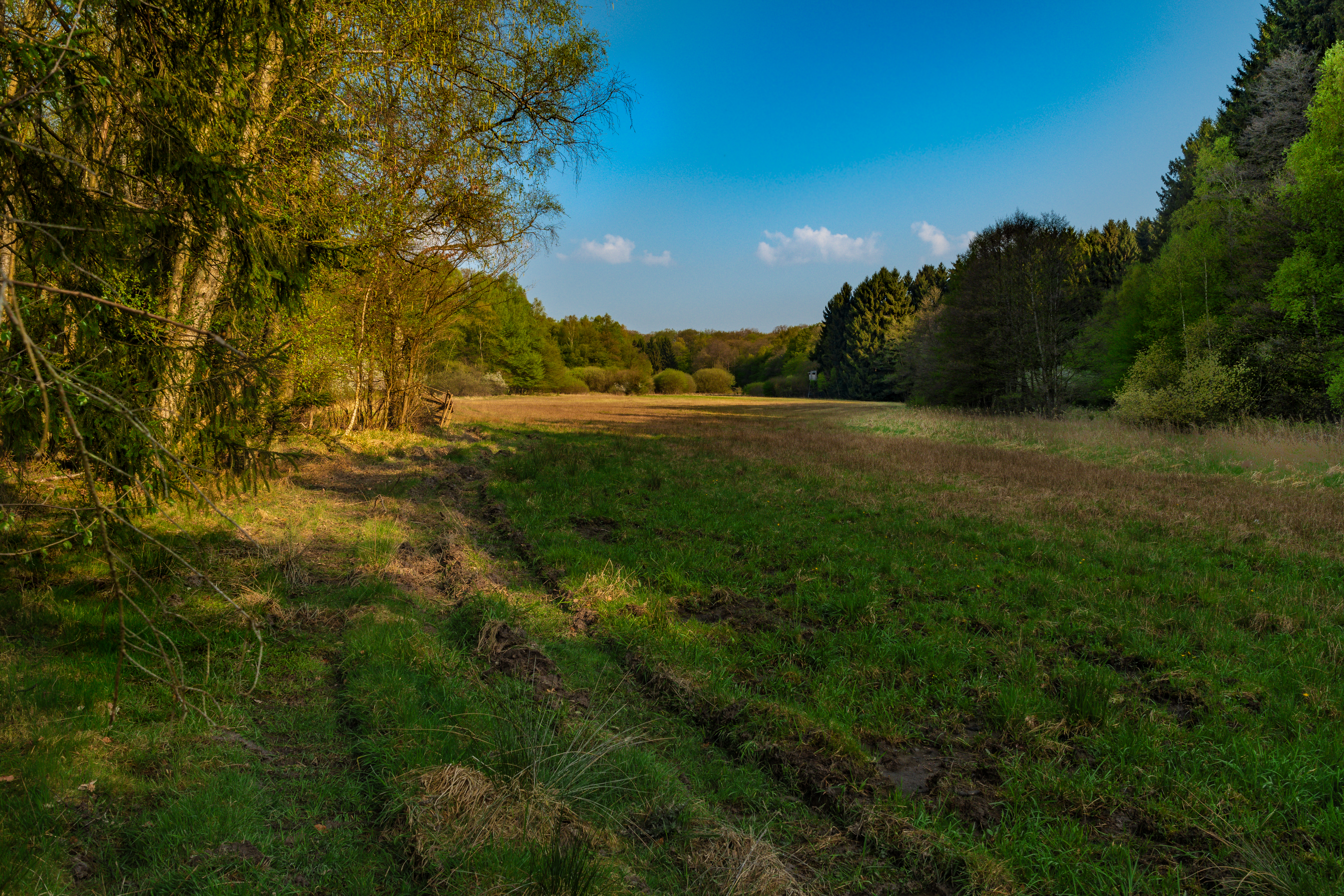 5911-301 NSG Struth (FFH-Gebiet). Das Naturschutzgebiet Struth im Rhein-Hunsrück-Kreis